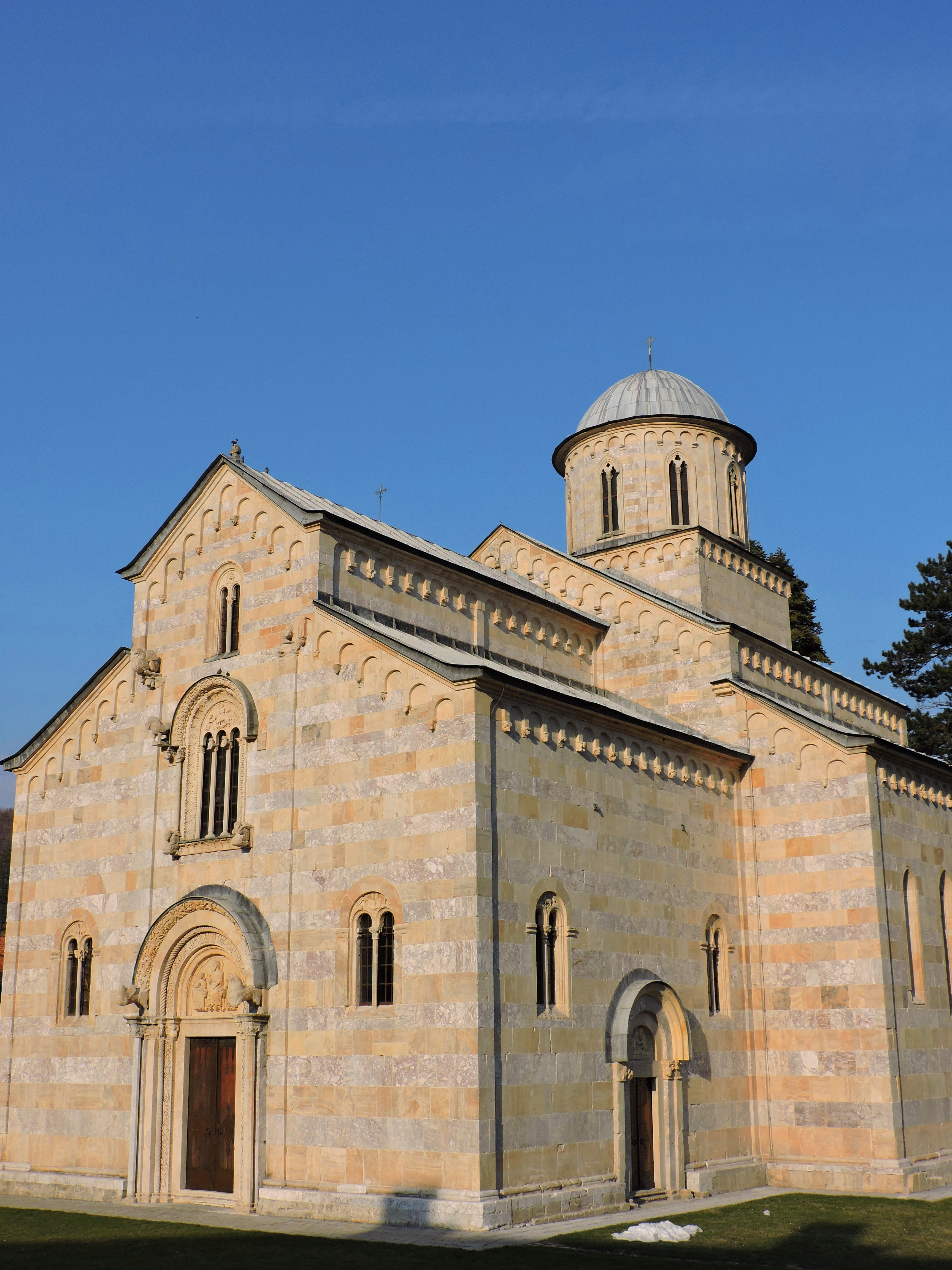 Manastiri i Deçanit